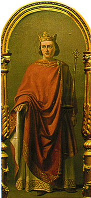 Teobaldo II (izquierda) y Teobaldo I, en el Salón del Trono del Palacio de la Diputación Foral de Navarra. Pinturas obra de Francisco Mendoza